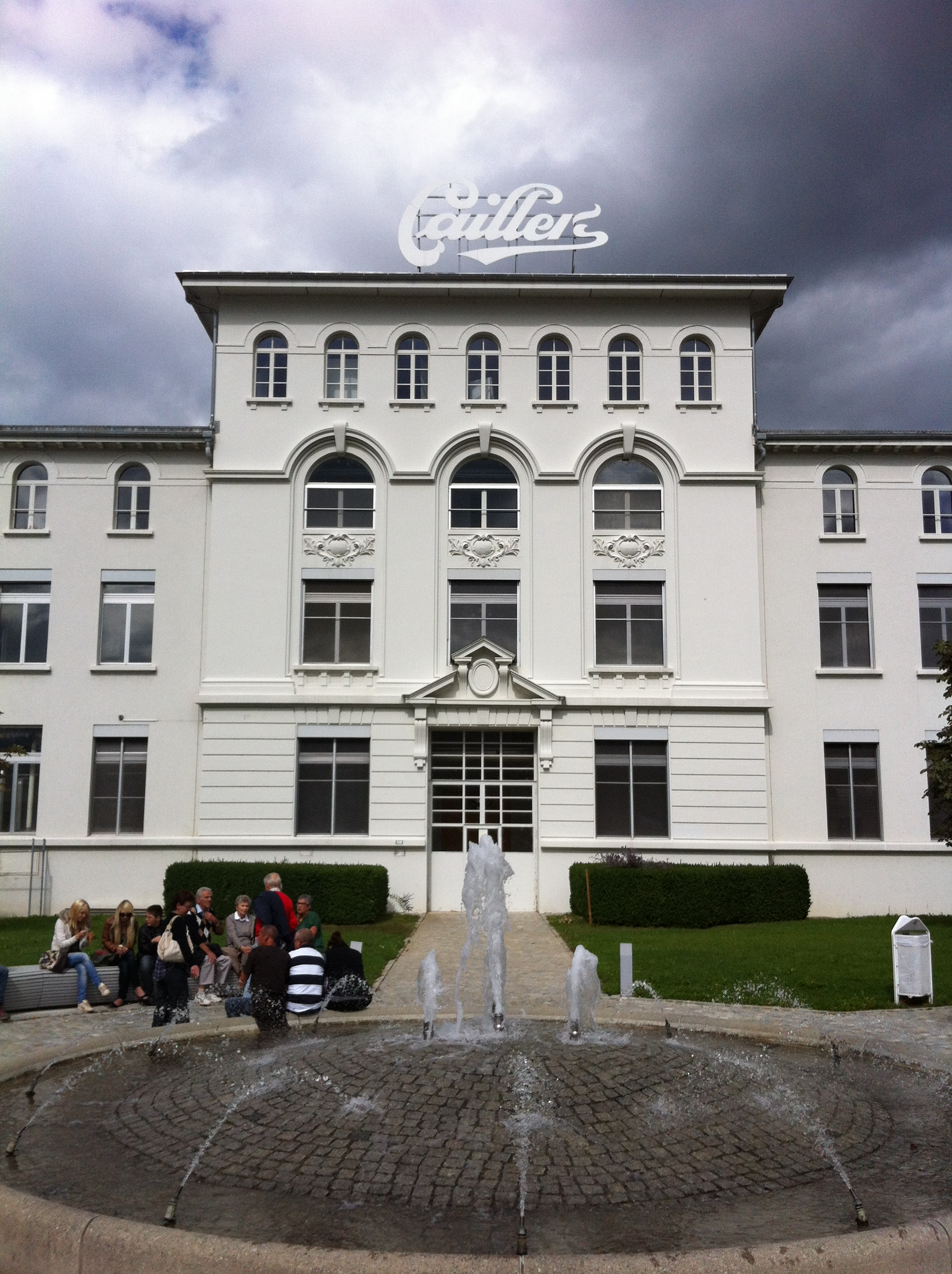 Cailler, Broc FR